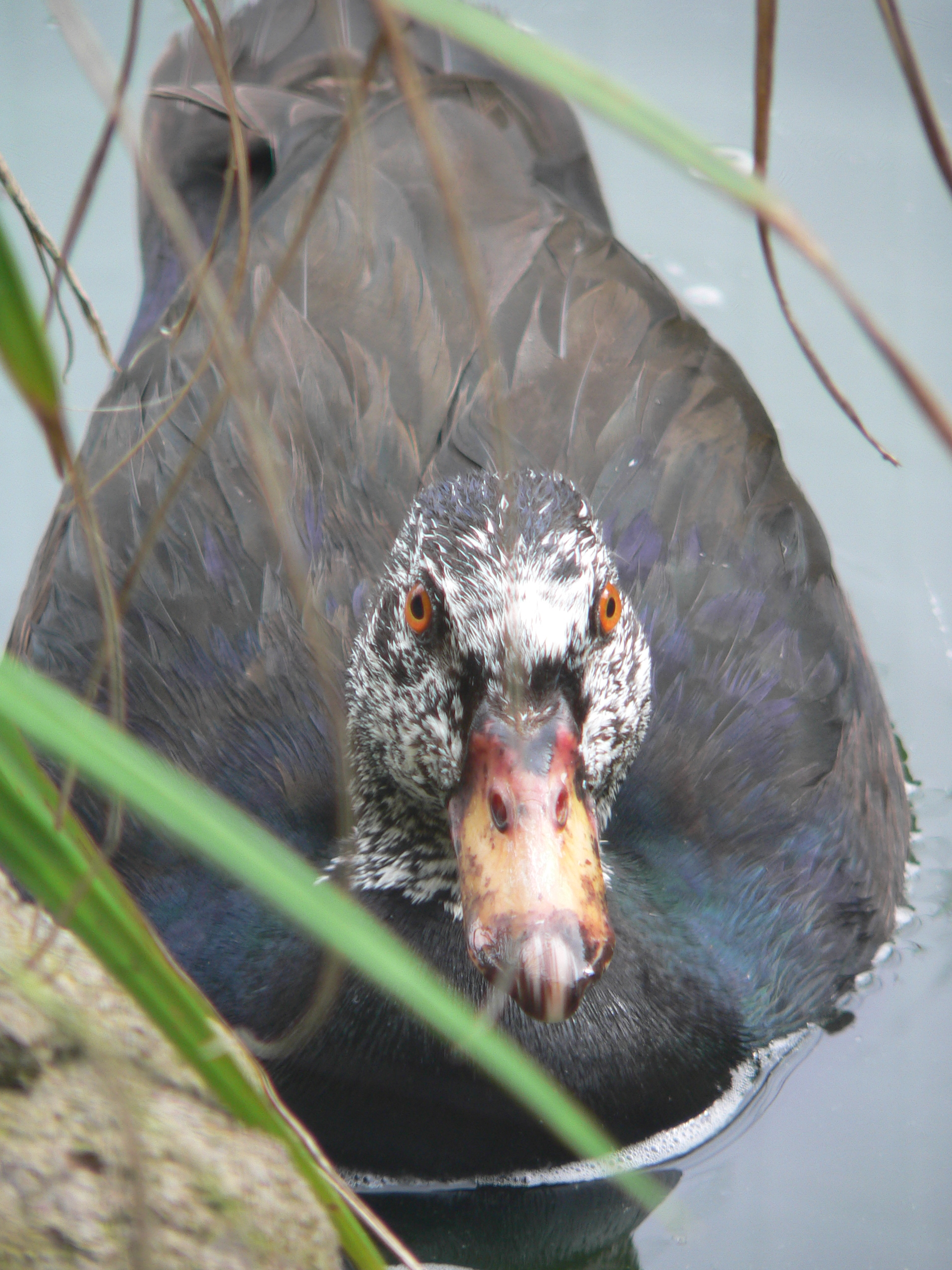 Cairina scutulata